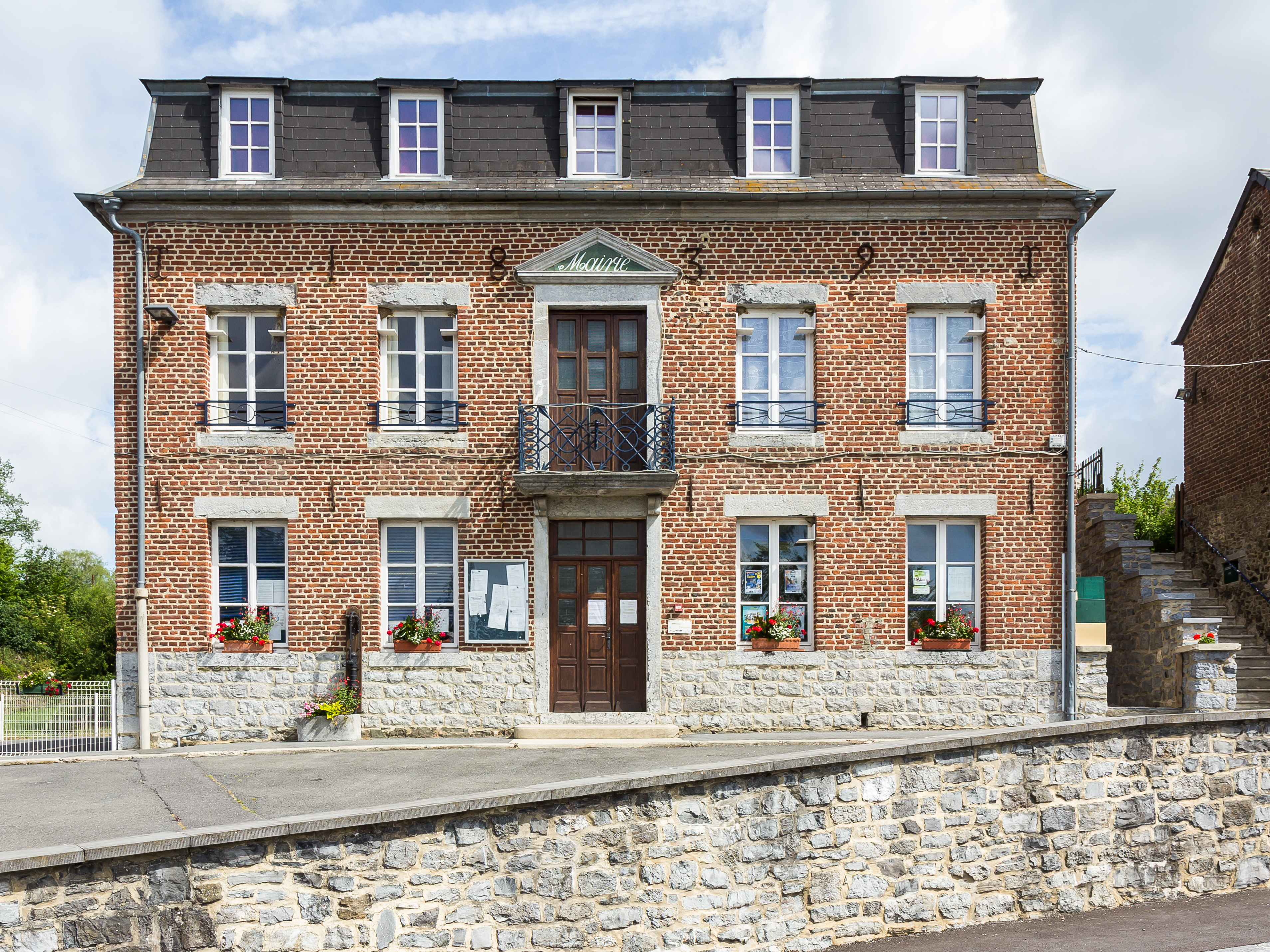 Mairie, Eppe-Sauvage